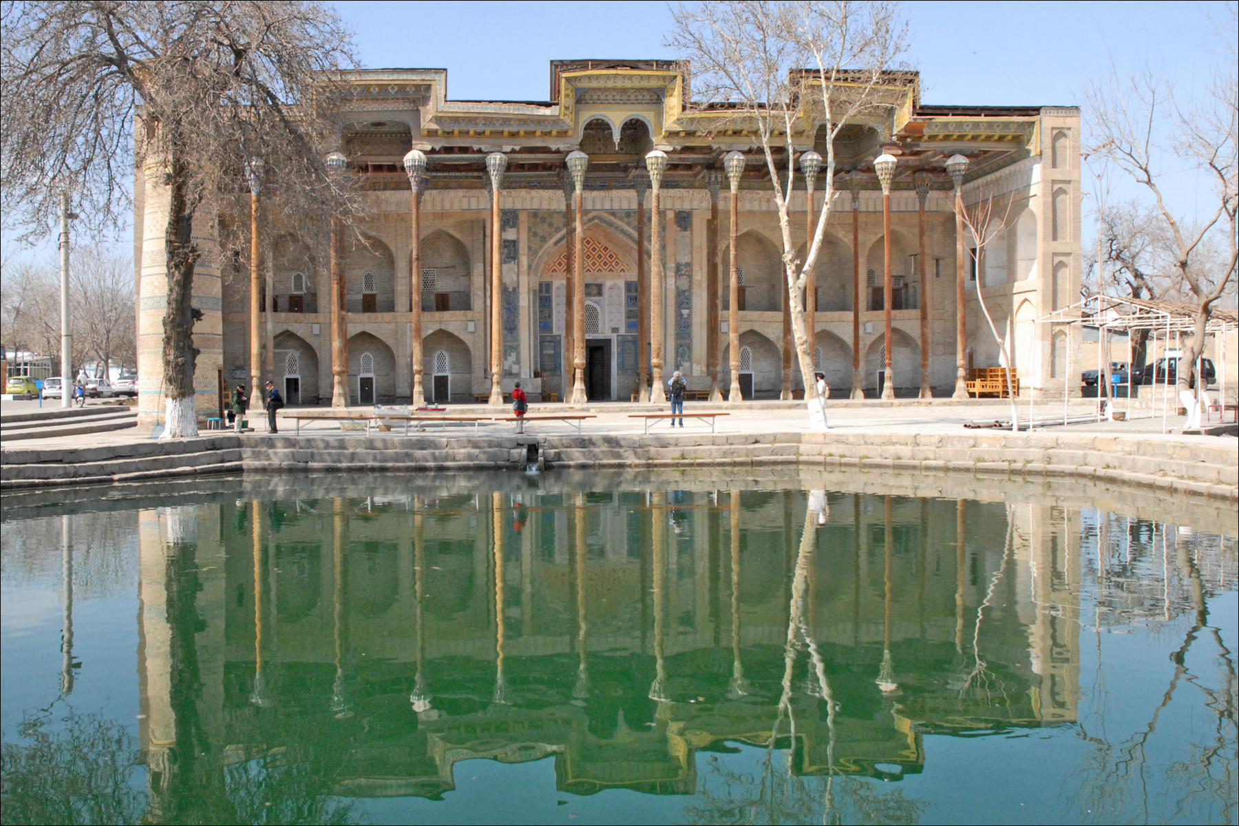 La mosquée Bolo-Khaouz (ou Bolo-Haouz) est une mosquée du vendredi. La partie intérieure date de 1712, par contre l'Iwan (l'avant-toit pour l'été) date du début du XX ème siècle; Elle fait partie d'un ensemble architectural comprenant un bassin (Khaouz), un minaret et une mosquée. Le tout est face à la citadelle de l'Ark.